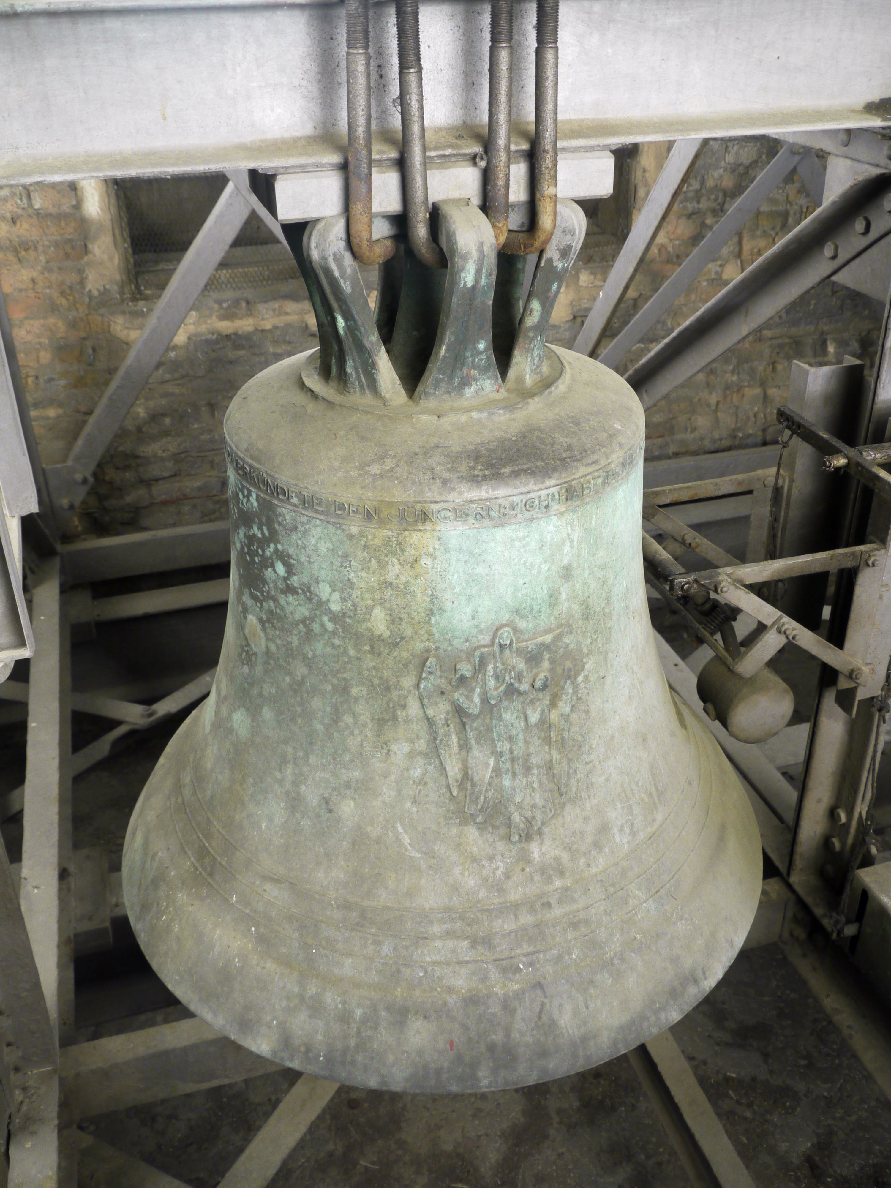 Die Kirchenglocke "Mater Dolorosa" mit zusätzlichem Außenklöppel für das Läuten während der Wandlung auf der Tonhöhe g.